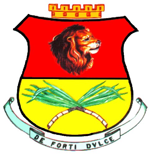 Escudo del municipio Campo Elías, estado Mérida, Venezuela